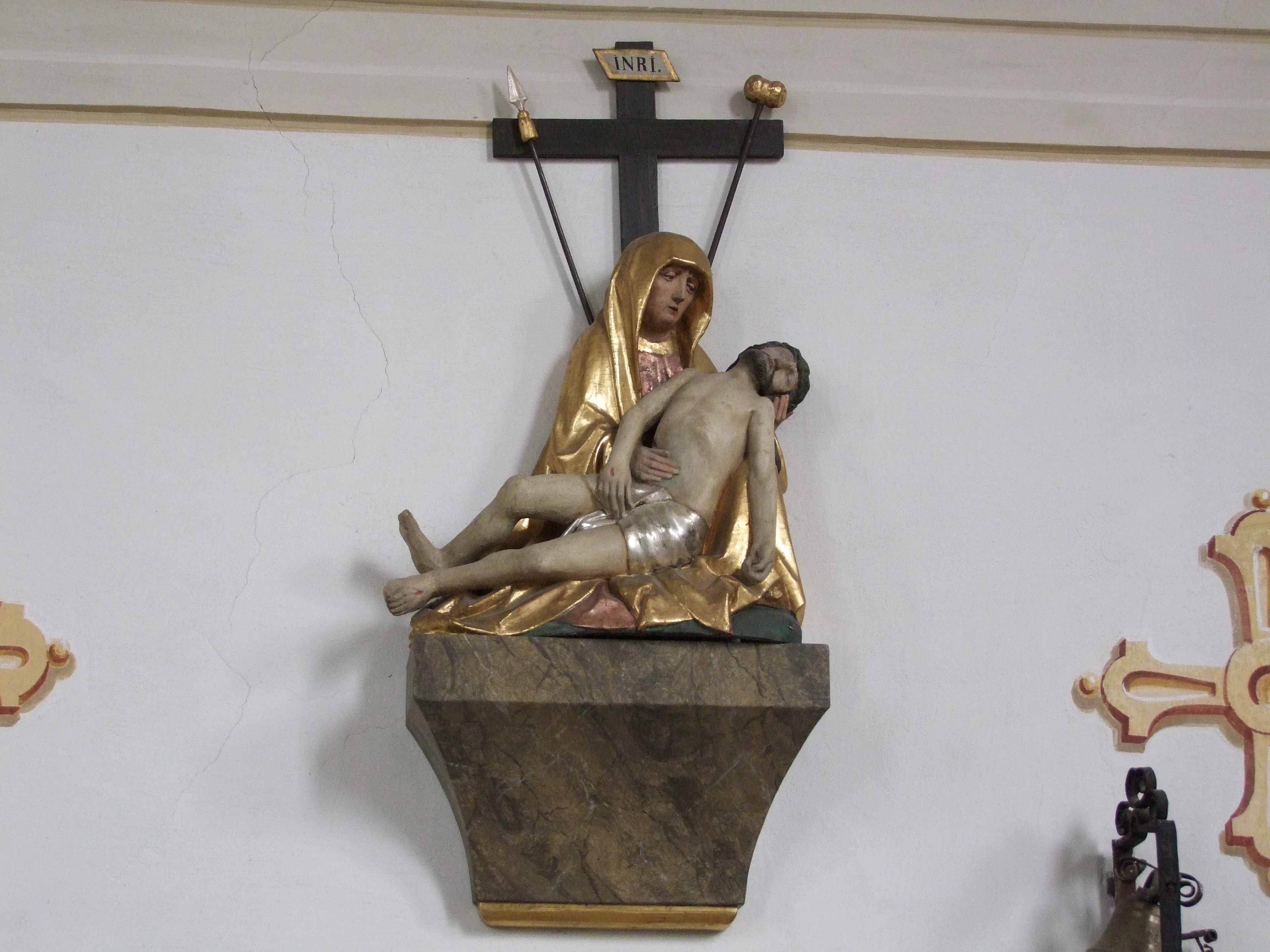 St. Michael in Stockach in Schwaben